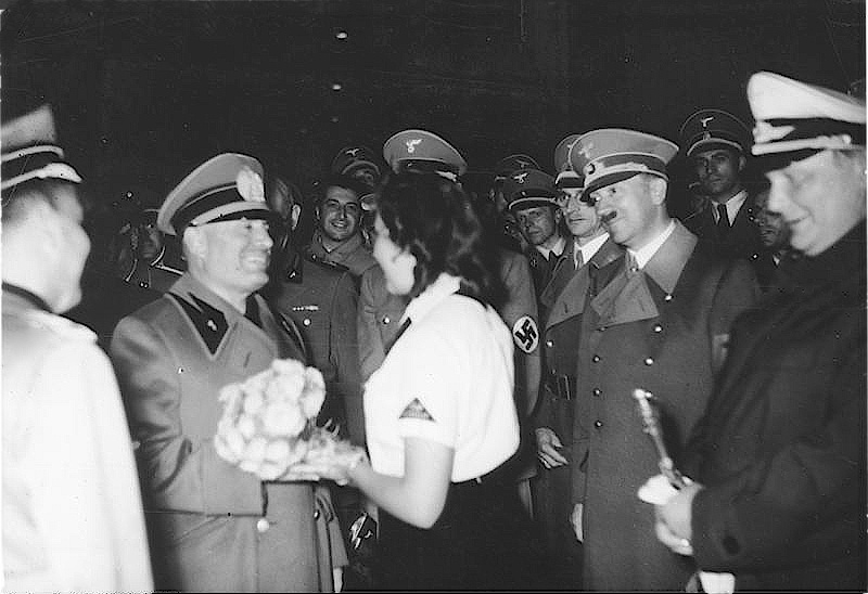 Der Duce nahm herzlichen Abschied von München Unmittelbar nach Beendigung der Viermächtebesprechung im Führerhaus in München, begab sich der Duce in Begleitung des Führers zum Bahnhof, um seinen Zug zur Rückfahrt nach Italien zu besteigen. Kurz vor der Abfahrt überreichte ein BDM-Mädchen dem Duce einen Blumenstrauss. Die beiden Staatsmänner verabschiedeten sich darauf in einer besonders herzlichen Weise. UBz: den Führer, Mussolini und (ganz rechts) Generalfeldmarschall Göring. Scherl Bilderdienst, Berlin 30.9.1938